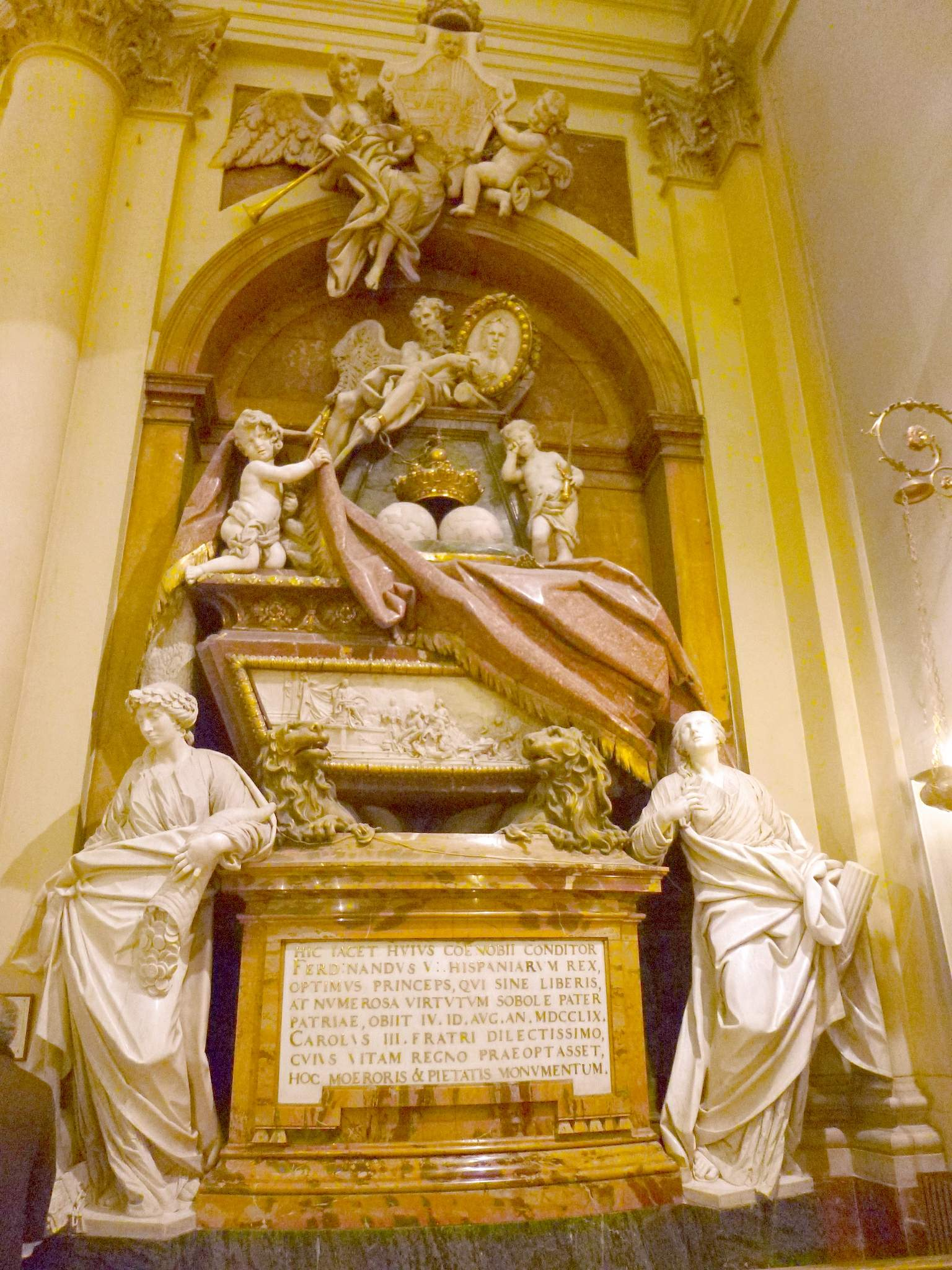 Mausoleo de Fernando VI, en la Iglesia de Santa Bárbara, antiguo Convento de las Salesas Reales (Madrid)